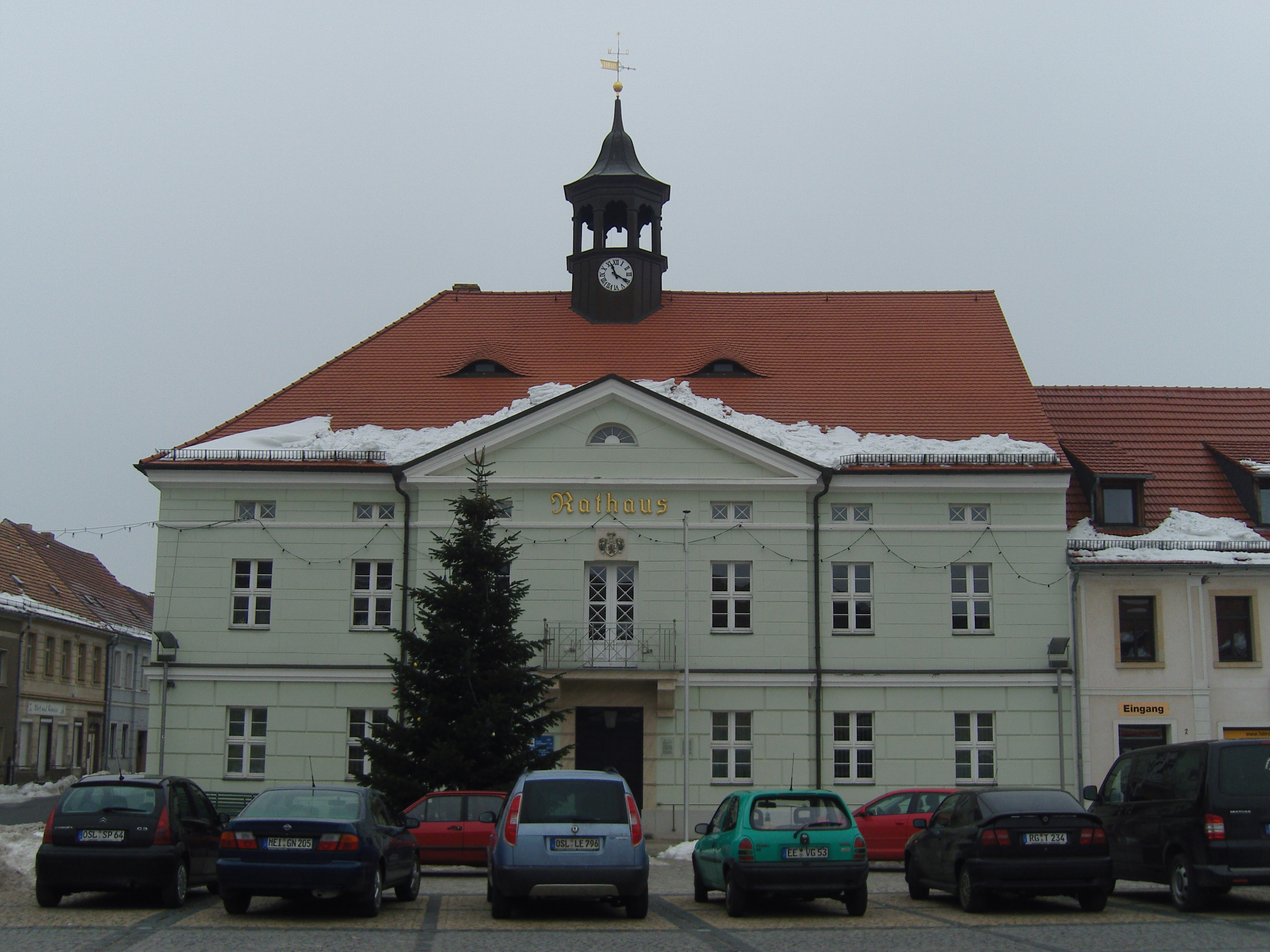 Das Rathaus in Ortrand, Baudenkmal